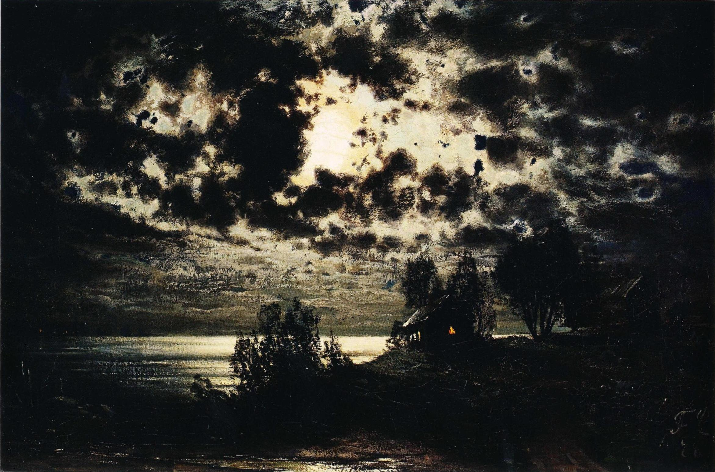 Fanny Churbergin maalaus, kuuluu Fortumin Taidesäätiön kokoelmiin. Saman maalauksen harjoitelma on Ateneumin kokoelmissa.